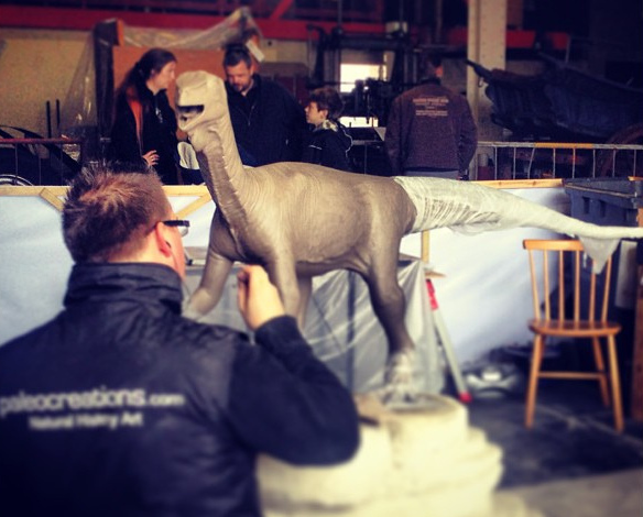 via Instagram ift.tt/1aZ4tW9